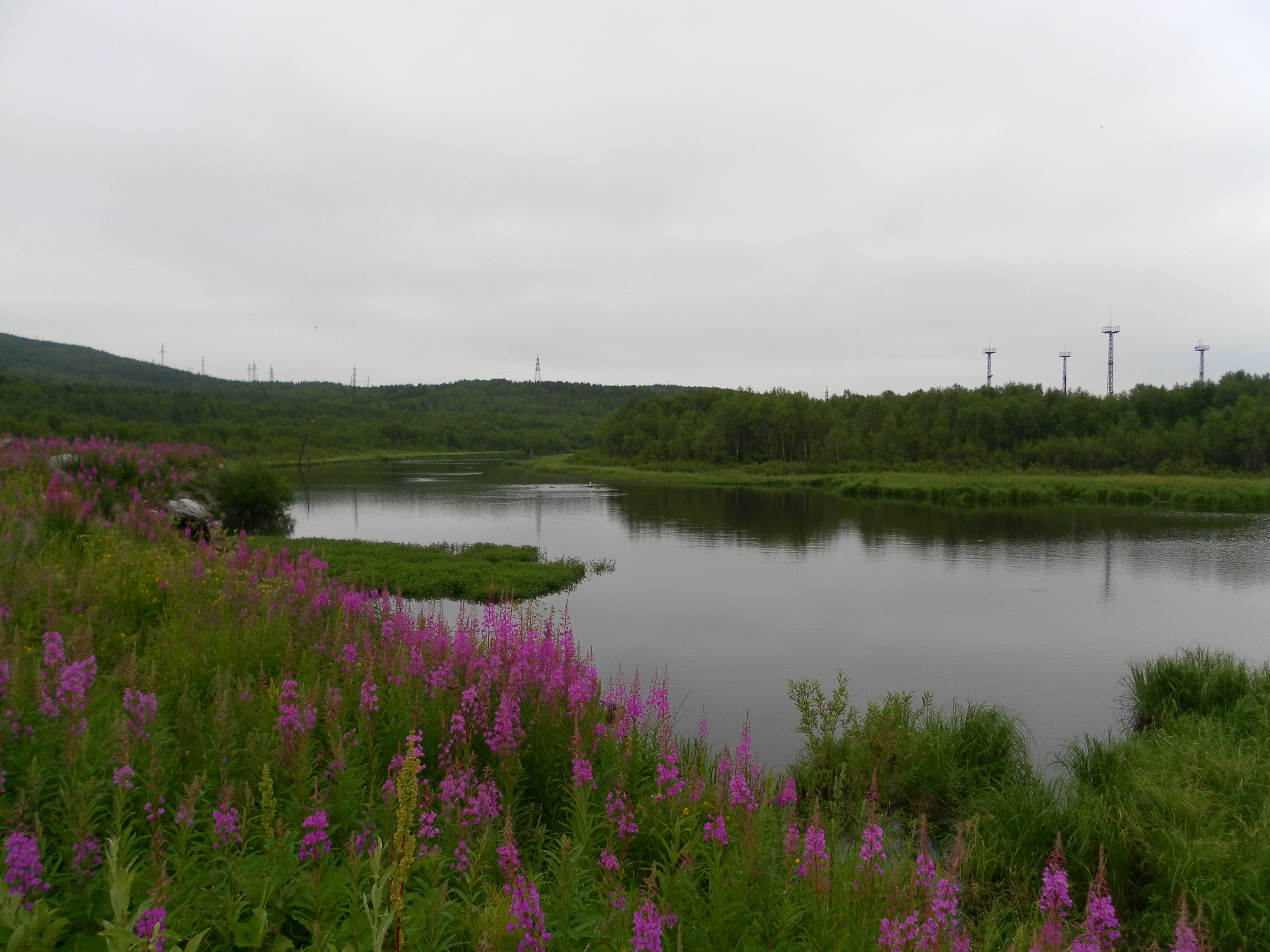 Птицы на Росте